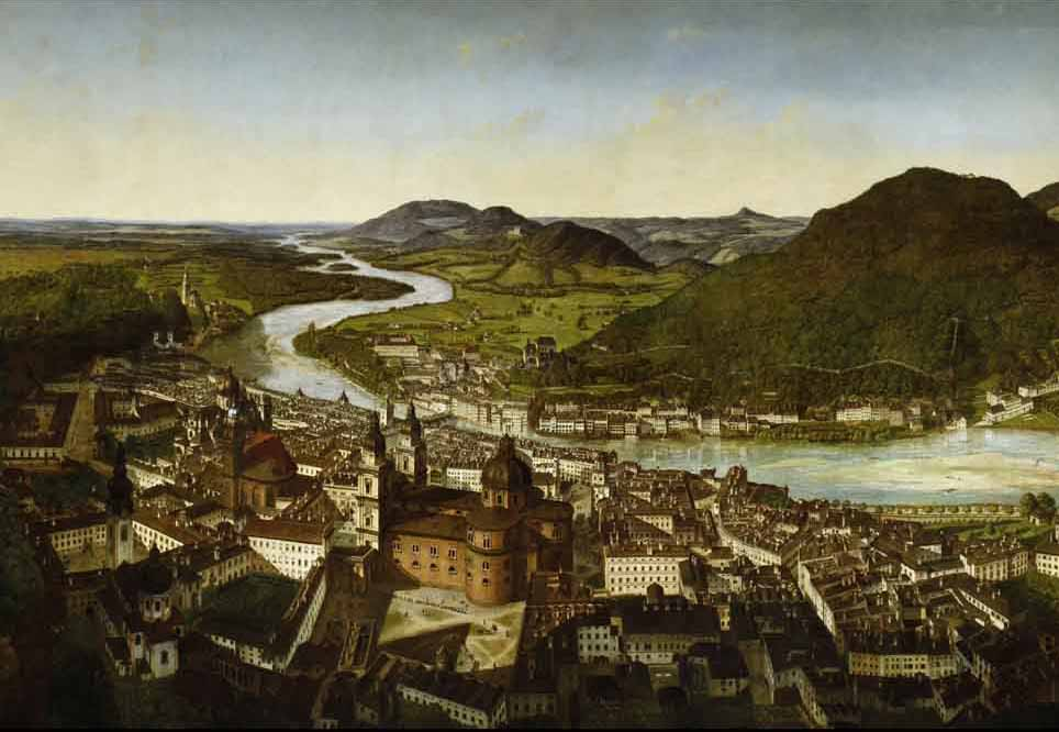 Panorama der Stadt Salzburg (1825-1829) von J. M. Sattler, Detail Stadt; Salzburg Museum